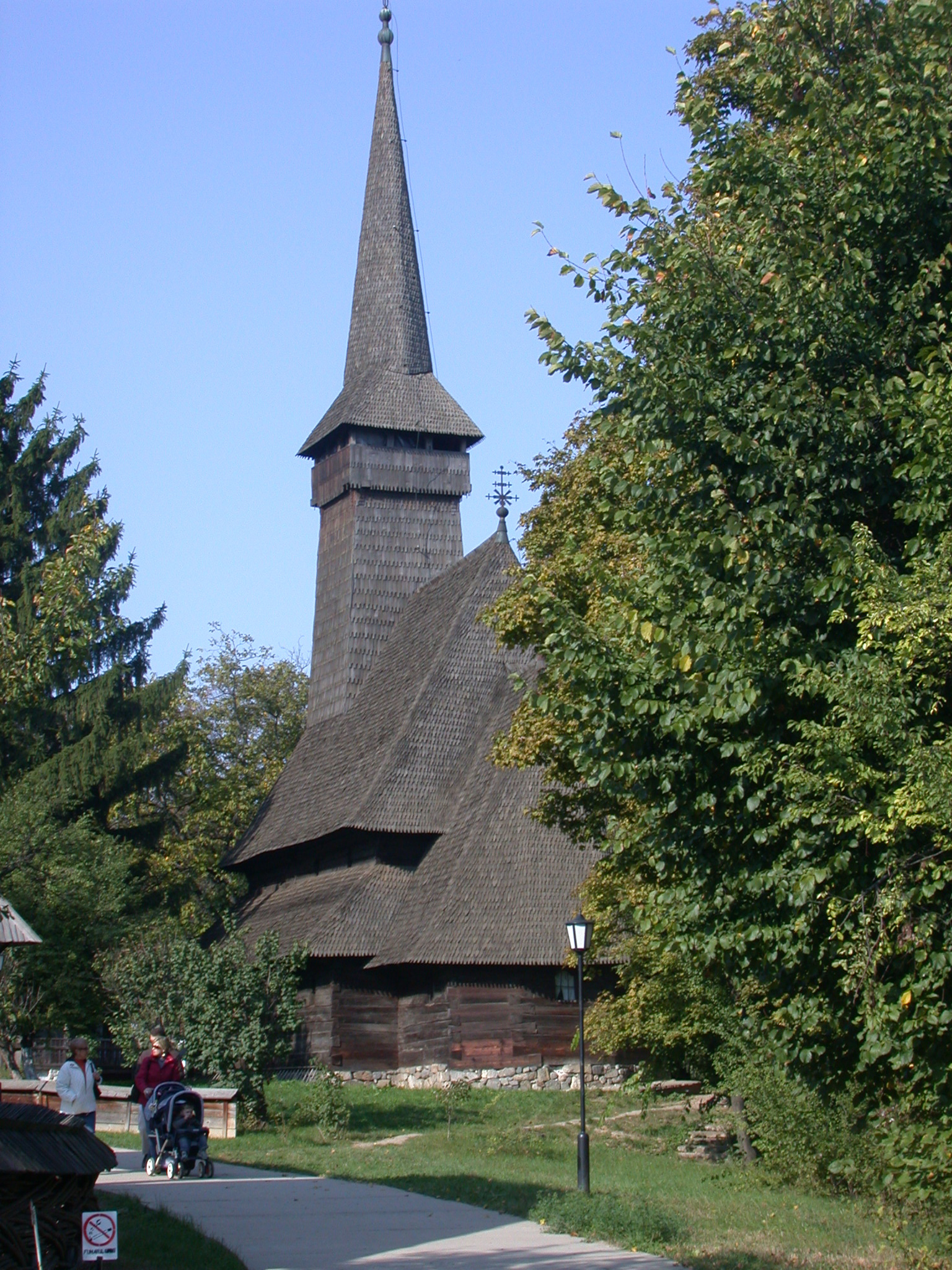 Romania, Bucarest, chiesa in legno dalla Transilvania, nel "Village Museum"